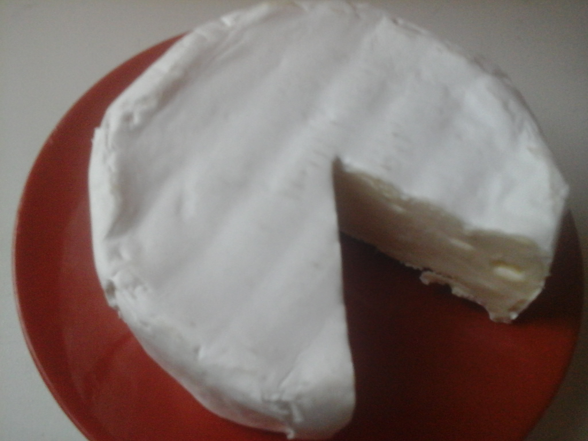 Fromage bio fabriqué par la fromagerie Milleret de Charcenne.